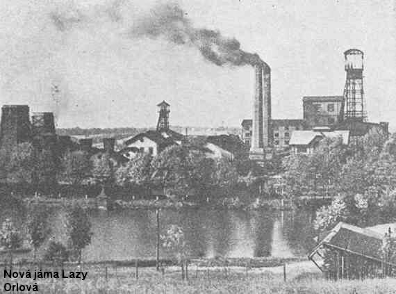 Historický snímek dolu Lazy v Orlové